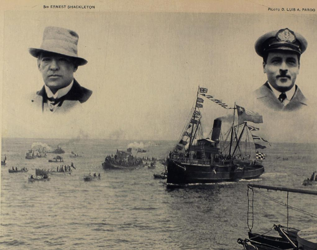 Escampavía Yelcho fue un buque explorador perteneciente a la Armada de Chile que se hizo famoso por el rescate de los sobrevivientes de la malograda expedición Shackleton en 1916. La unidad estaba comandada por el Piloto Pardo.